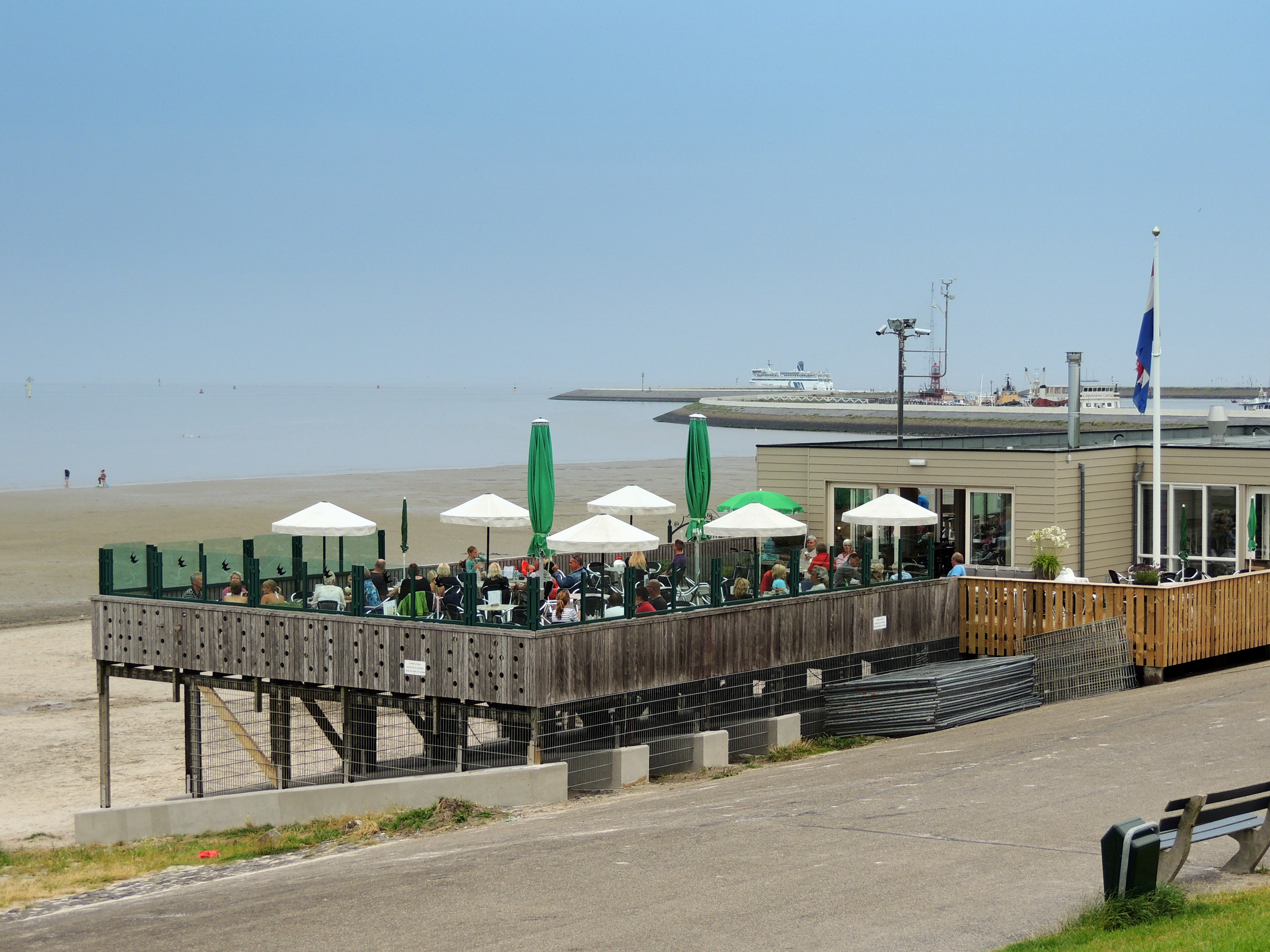 Strandpaviljoen Harlingen